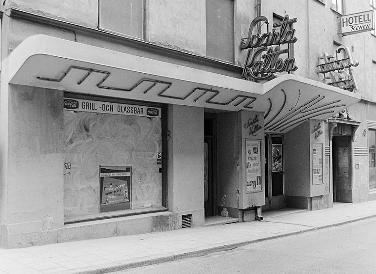 Vattugatan 5. Sexfilmsbiografen Svarta Katten